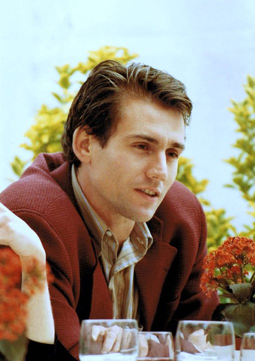 Wadeck Stanczack au festival de Cannes